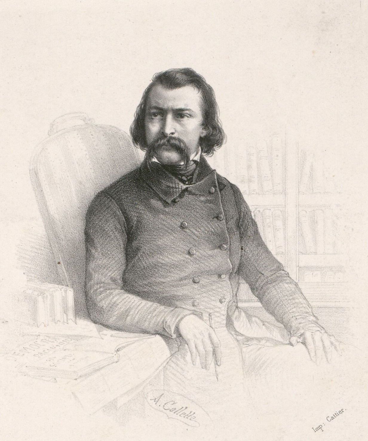 "Victor Considérant. Rédacteur en chef de la Démocratie pacifique. Représentant du Peuple. (Seine)".